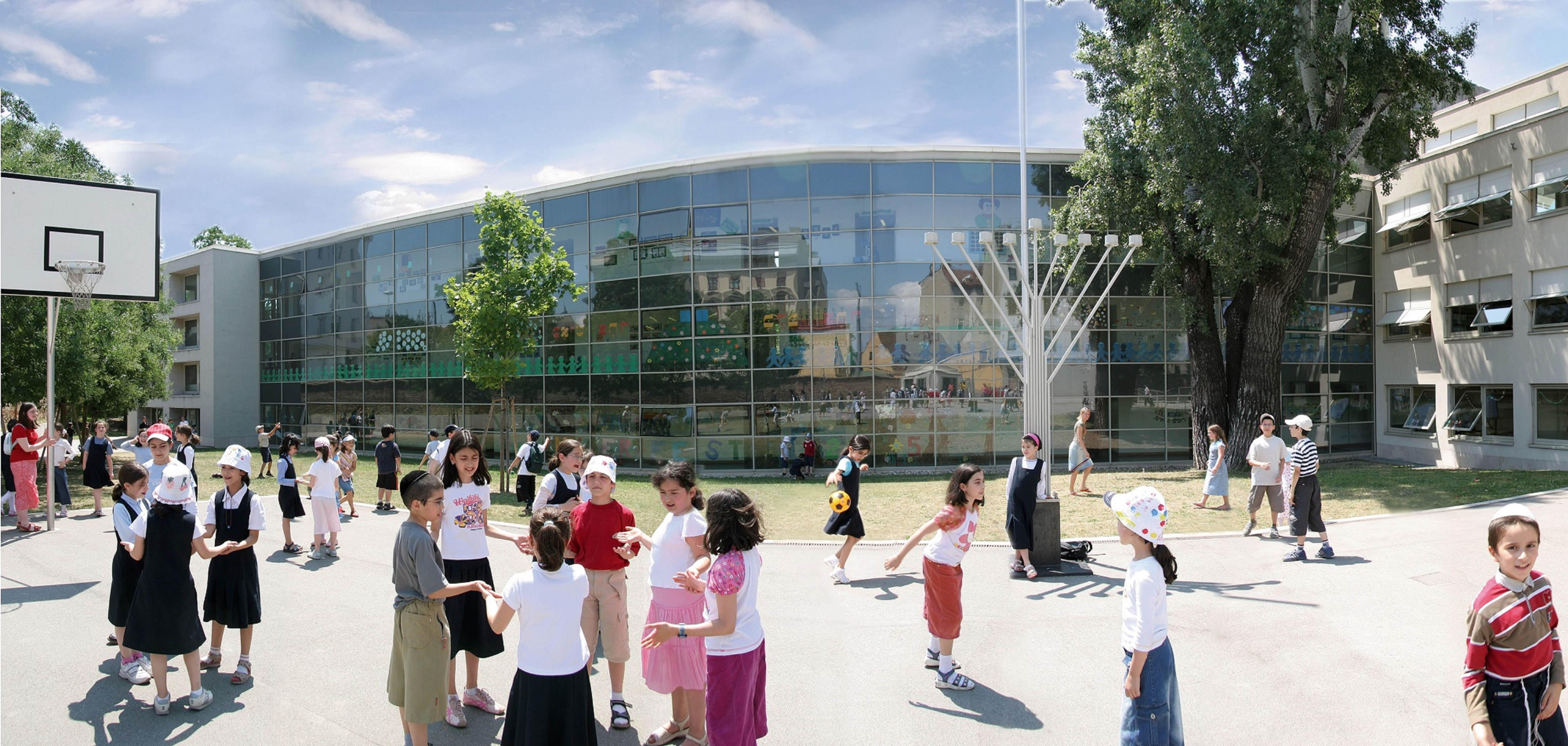 בווינה אוסטריה